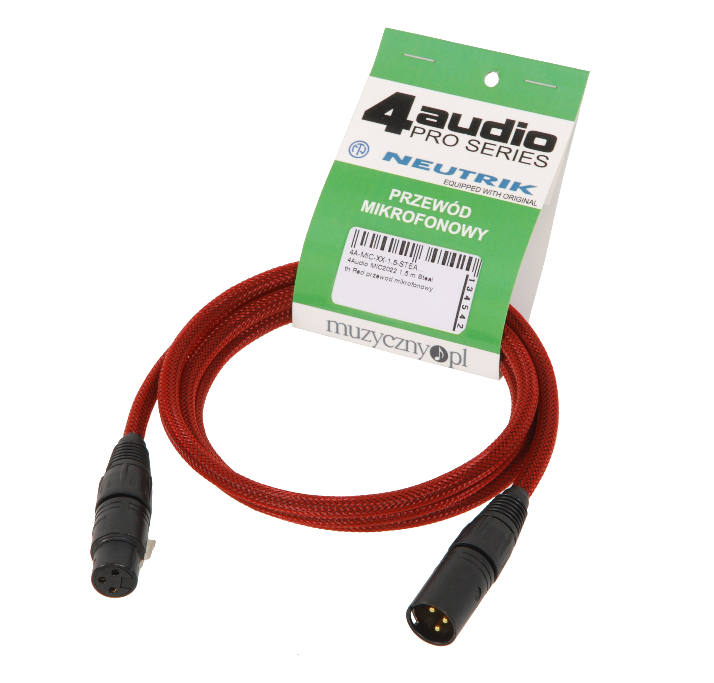 Przewód mikrofonowy MIC2022 1,5m Stealth Red w czerwonym oplocie firmy 4Audio